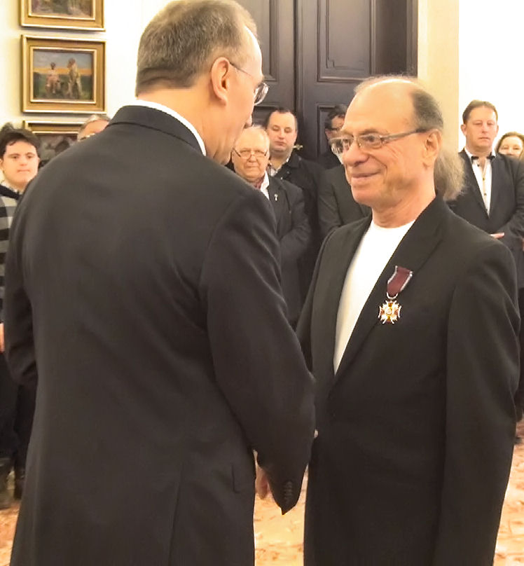 Aleksander Nowacki dostaje Złoty Krzyż Zasługi od Macieja Klimczaka, podsekretarza stanu w Kancelarii Prezydenta RP